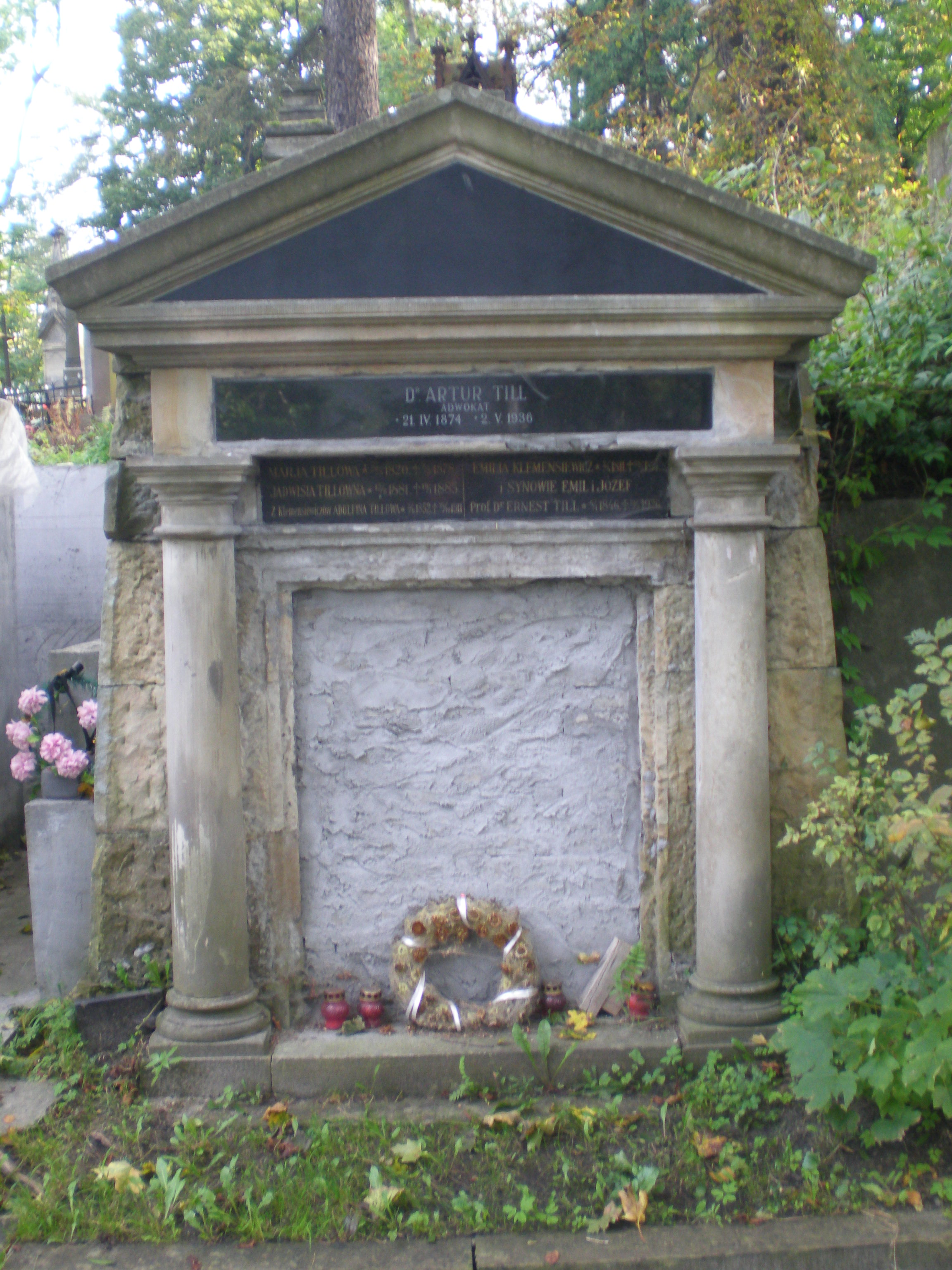 Grób rodziny Tillów na Cmentarzu Łyczakowskim we Lwowie